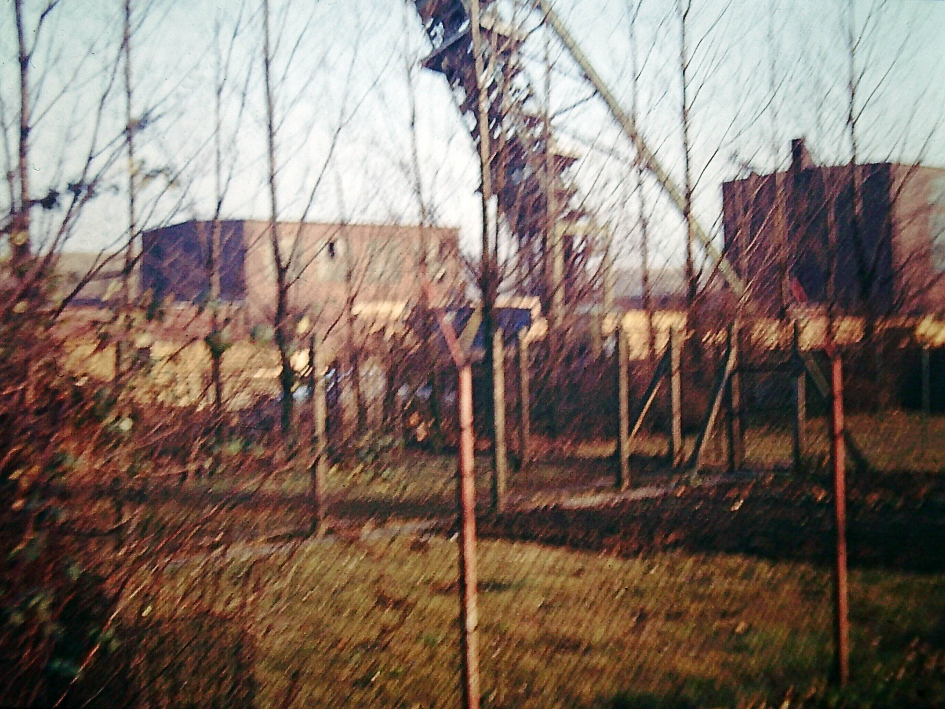 Sprengung eines Fördergerüstes der Grube Peine I/II vom Herrenkamp aus fotografiert. Es handelt sich dabei um ein ca. 40 Jahre altes Dia, das mit einem Diascanner gescannt und danach mit Adobe Photoshop bearbeitet wurde.